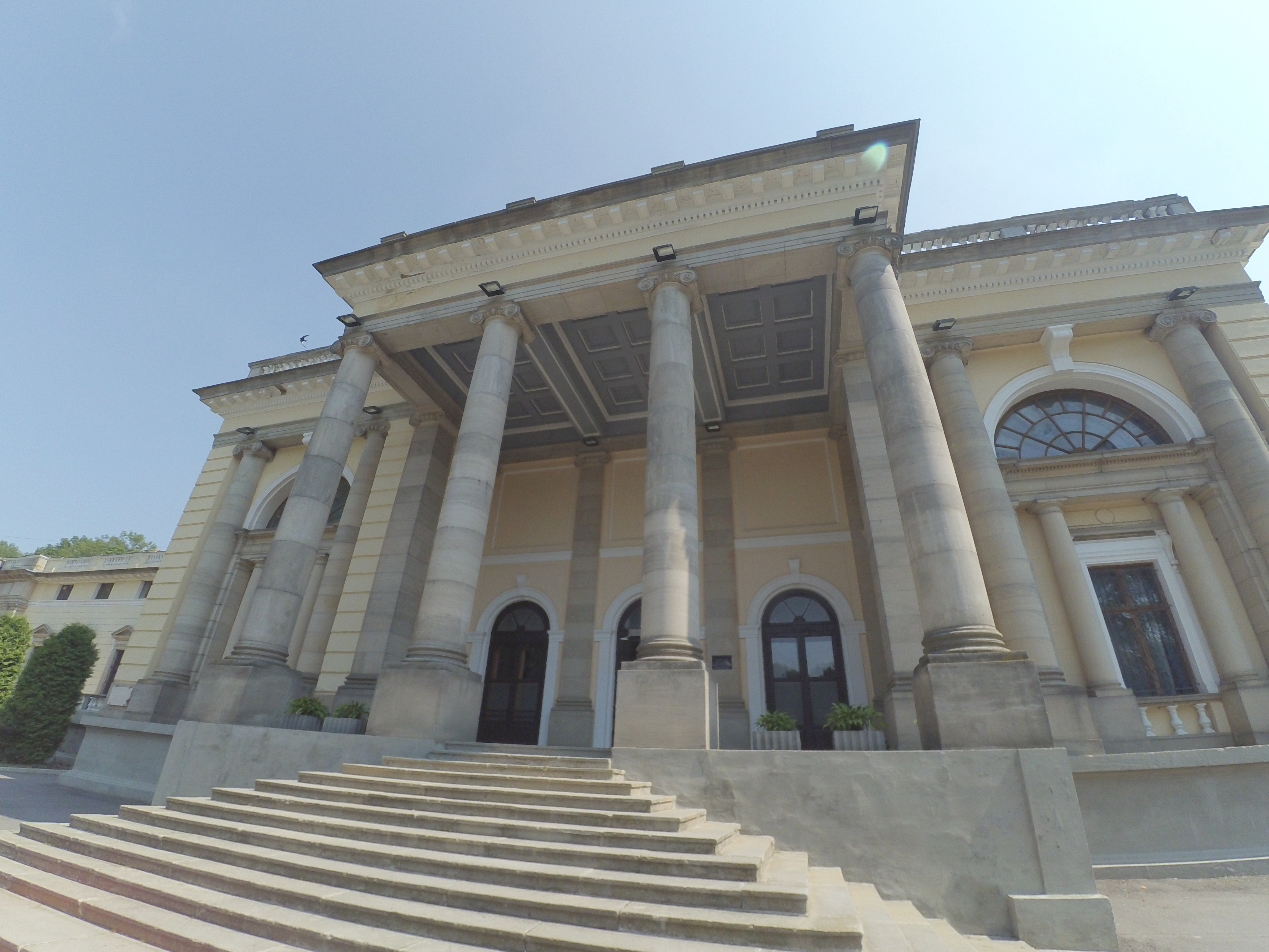 Дворец М.Г. Щербатовой (Строгановой) в Немирове